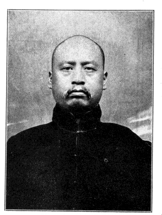 國會議員肖像